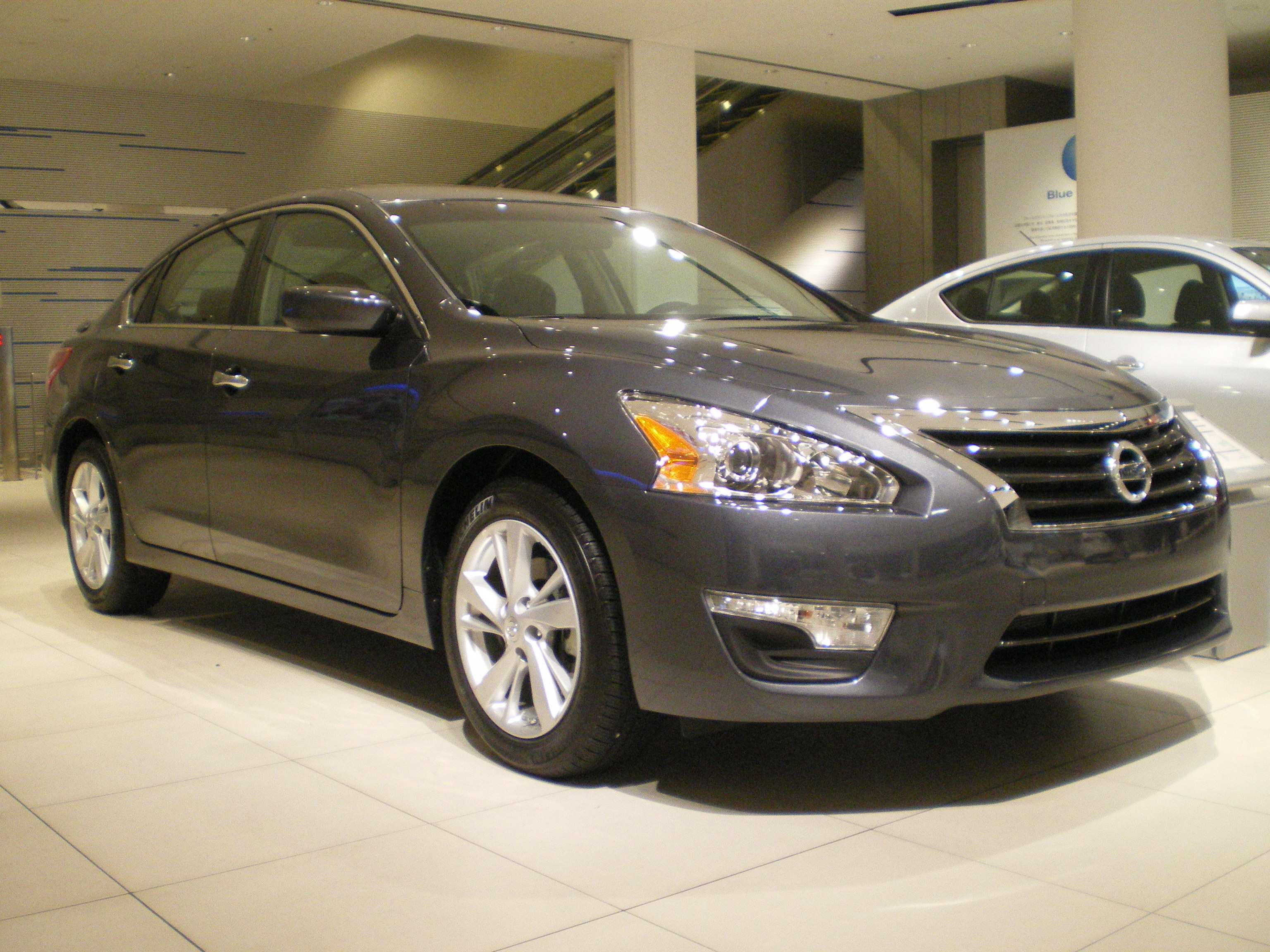 日産・アルティマ